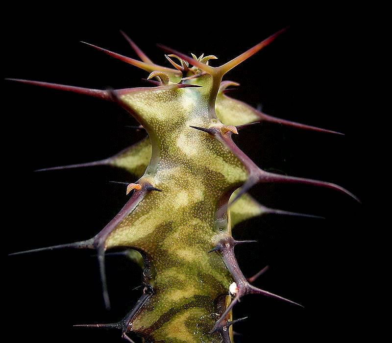 Euphorbia dauana